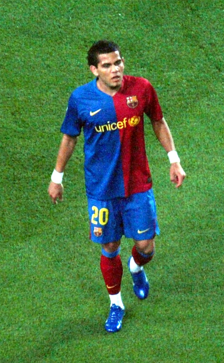 Dani Alves en el partido que enfrentó al FC Barcelona y al Almería CF correspondiente a la primera vuelta de la LNFP 2008/09 en el Nou Camp.